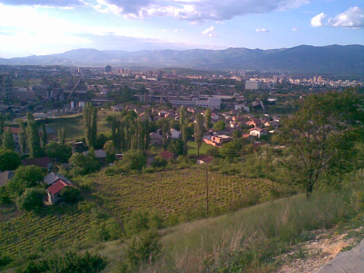 Поглед към новата част на селото Усие, циментовия завод и Скопие, Република Македония.